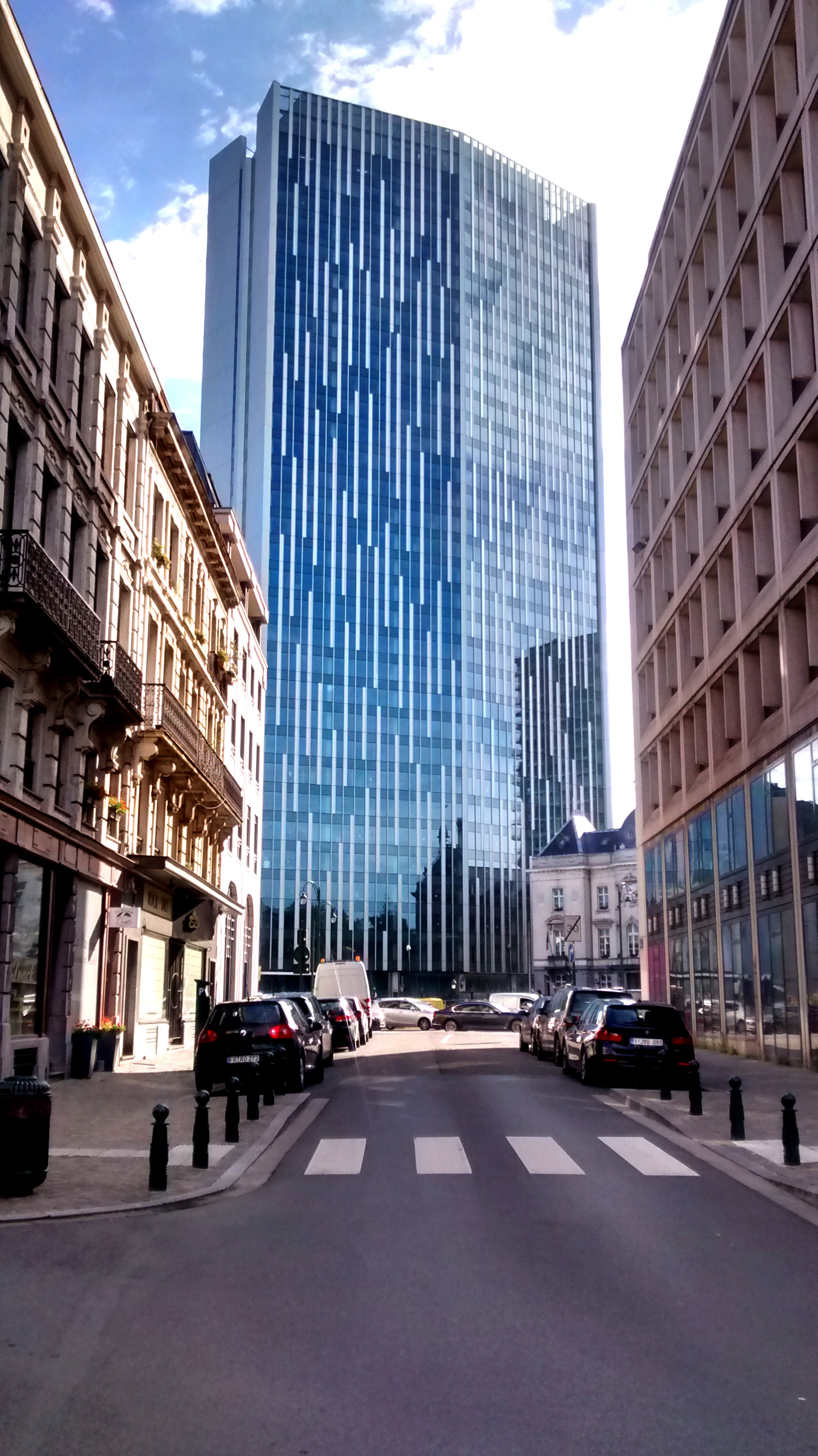 Torre Astro en Bruselas. Obra del Estudio Lamela